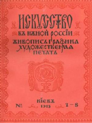 «Иску́сство в Ю́жной Росси́и» — ежемесячный журнал по вопросам изобразительного искусства